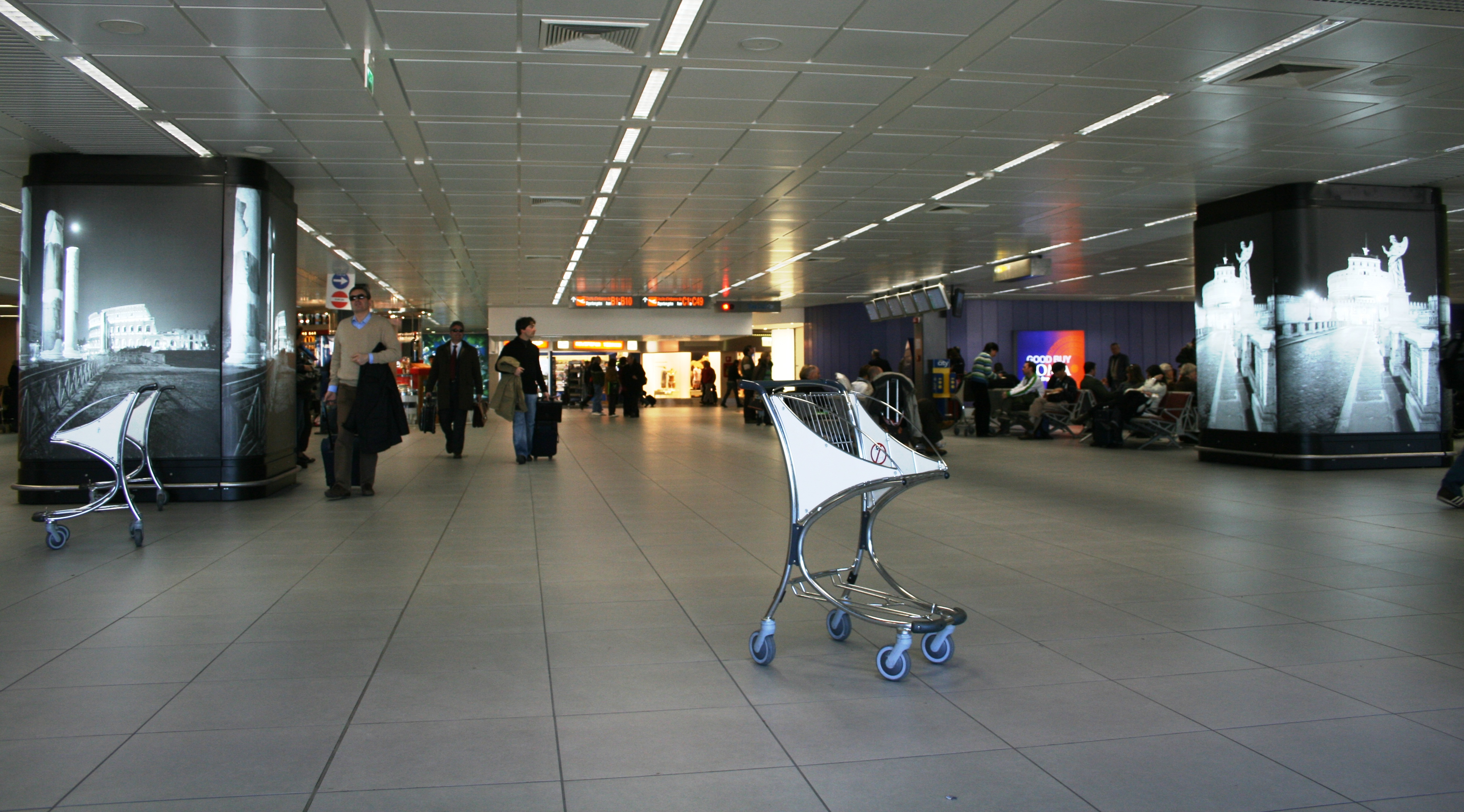 L'intérieur d'un terminal de l'aéroport de Rome-Fiumicino, en Italie.